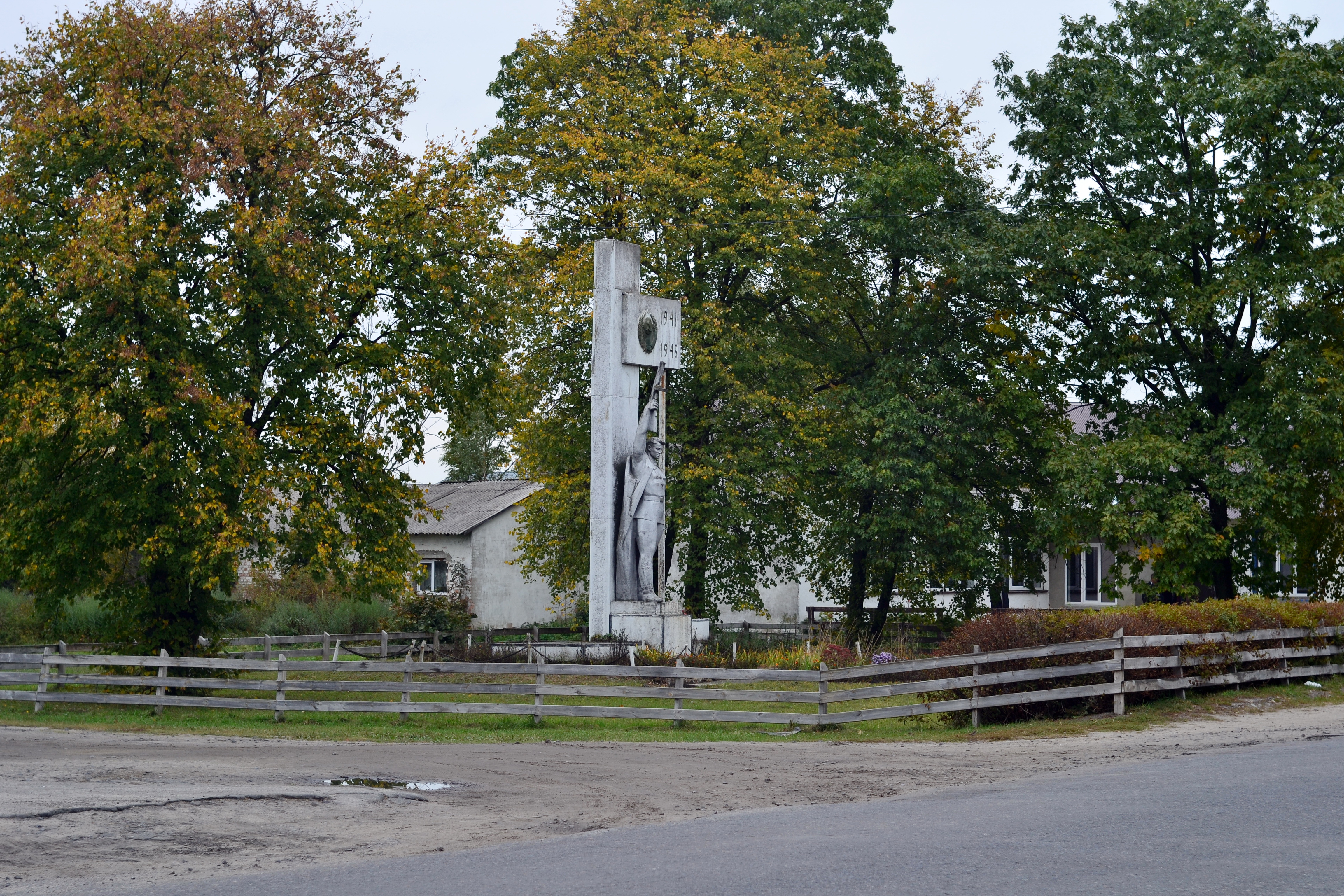 Пам'ятник землякам (1969 рік) - загальний вигляд у 2019 році - Сошичне (вул. Ковельська) Камінь-Каширський район Волинська область Україна